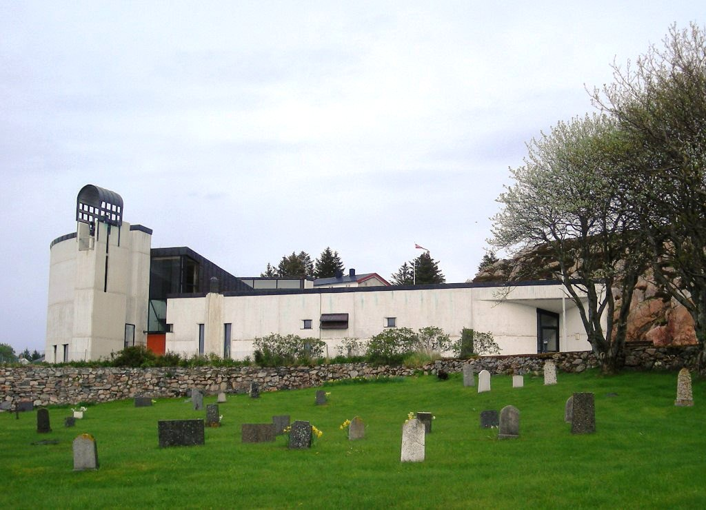 Sletta kirke på Frøya